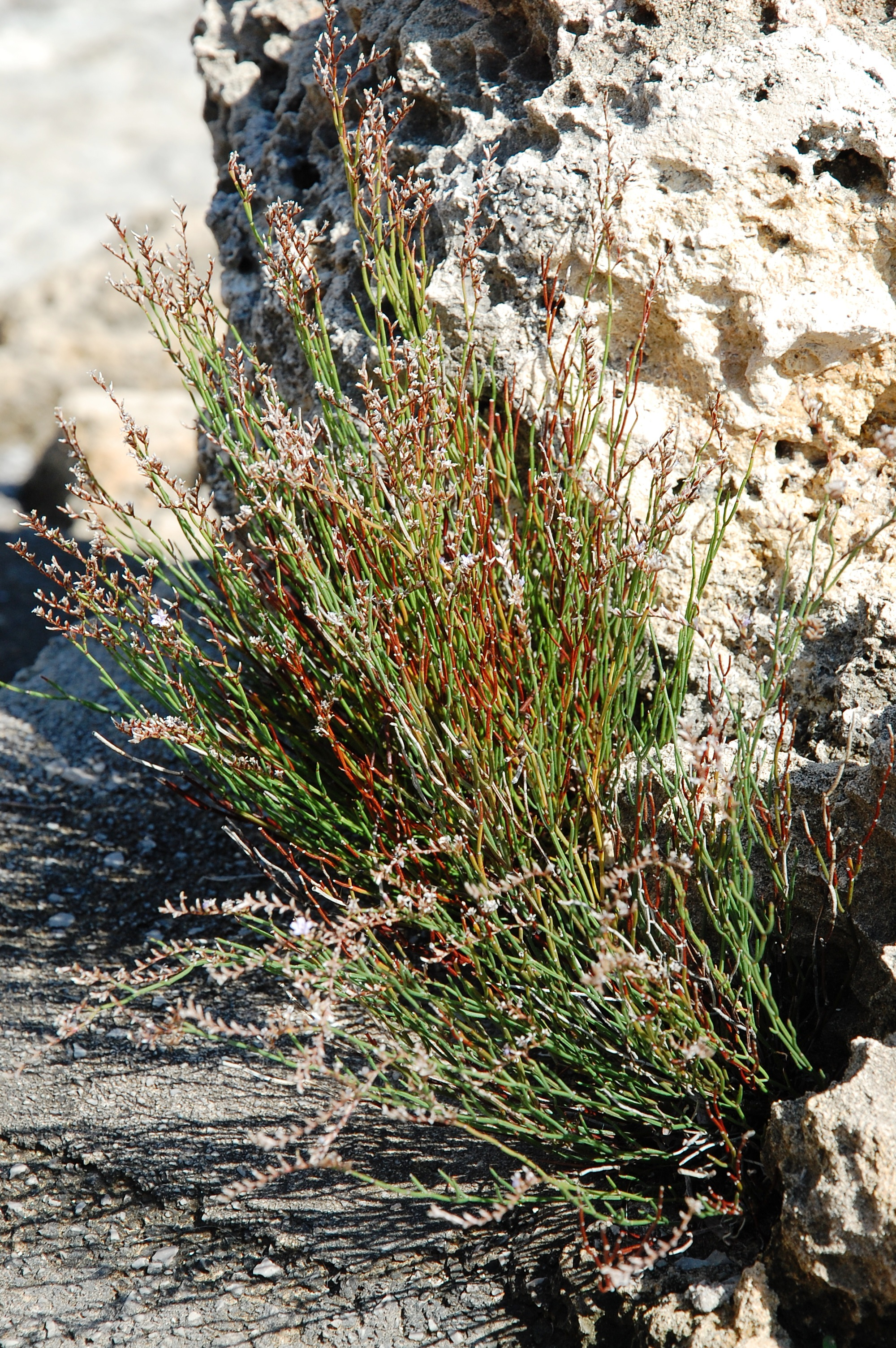 Limonium bocconei Addaura, Sicily